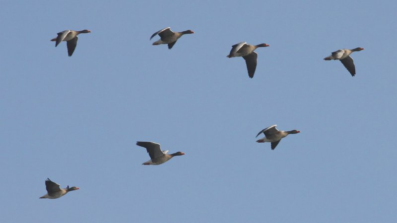 Greylag Goose (Anser anser)